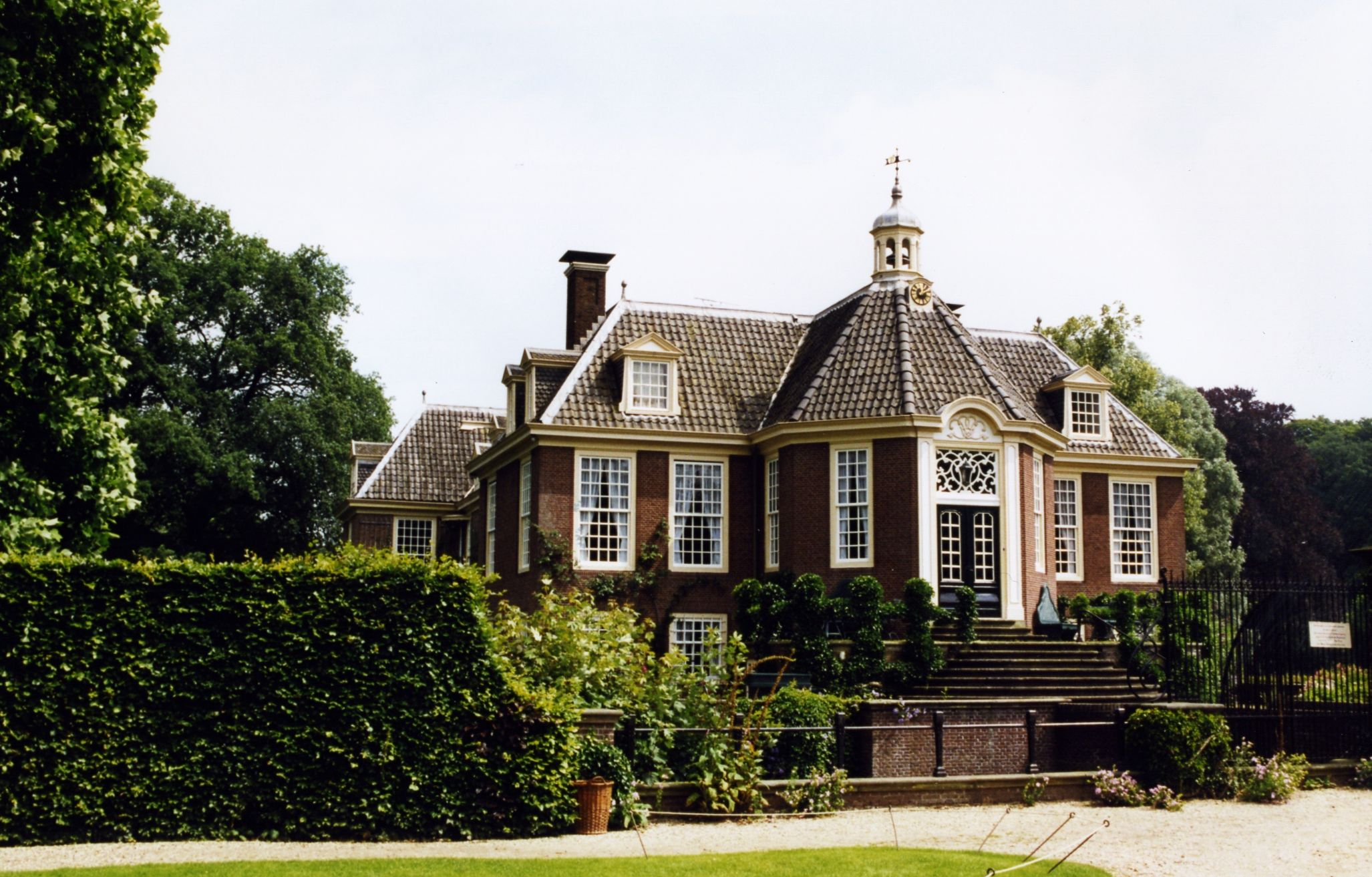 Kasteel de Wiersse te Vorden.